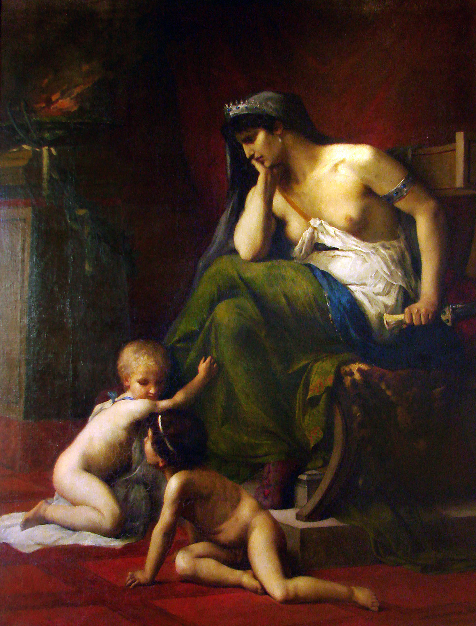 Médée (1868) par Henri Klagmann (1842-1871), musée des Beaux-Arts de Nancy.